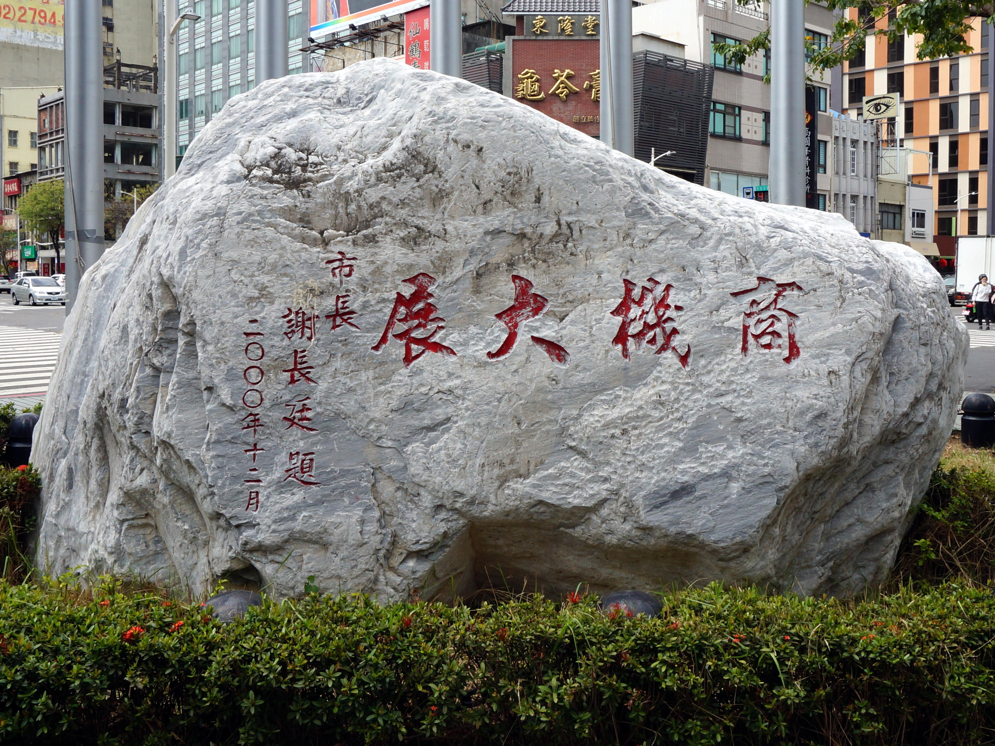 2000年12月，高雄市工商展覽中心完工，大門前樹立高雄市市長謝長廷題字「商機大展」石碑。2012年1月，高雄市工商展覽中心改造為高雄國際會議中心，此碑原地保留。